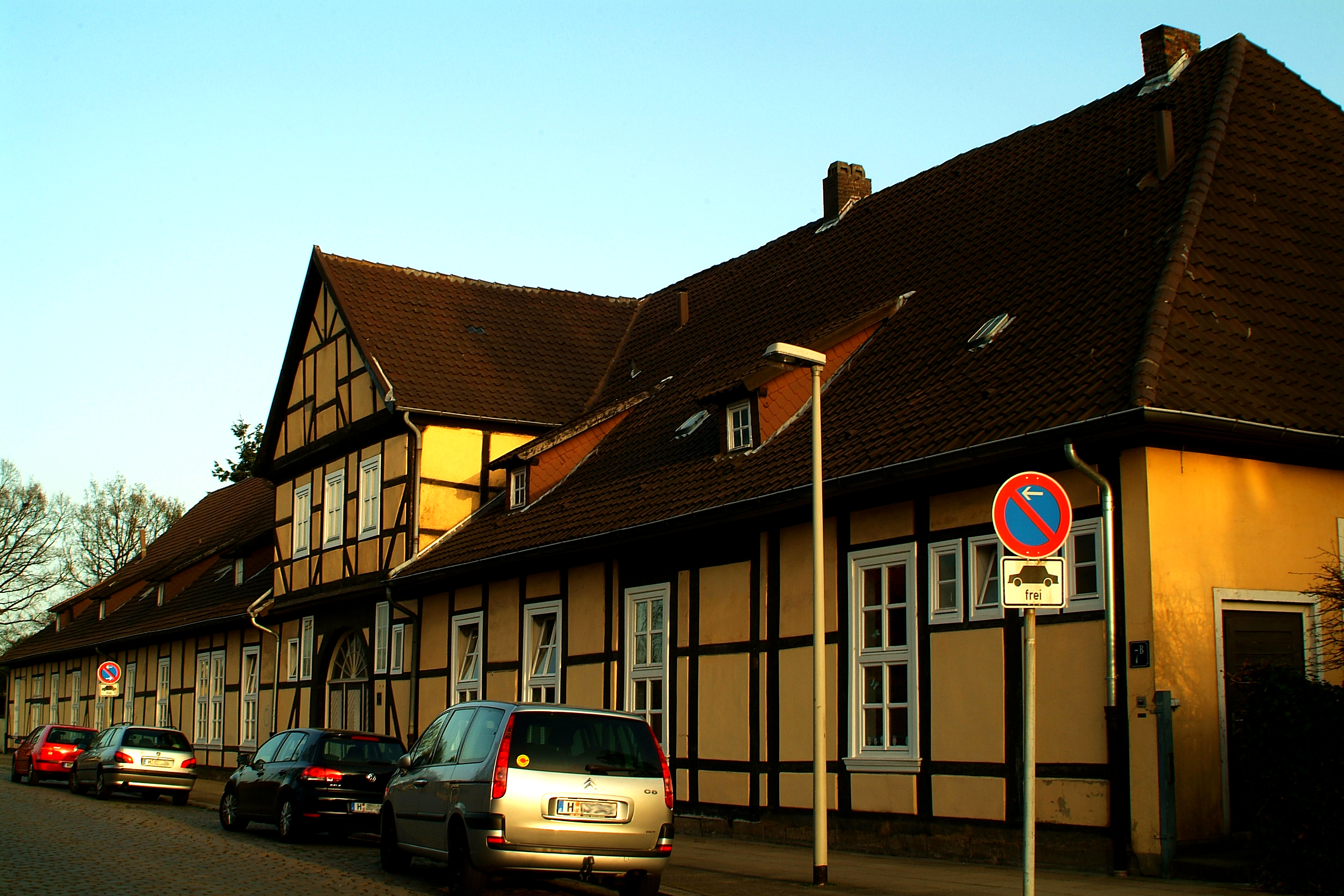 Das 1736 neu erbaute Fachwerkgebäude Alte Herrenhäuser Straße 7 ...